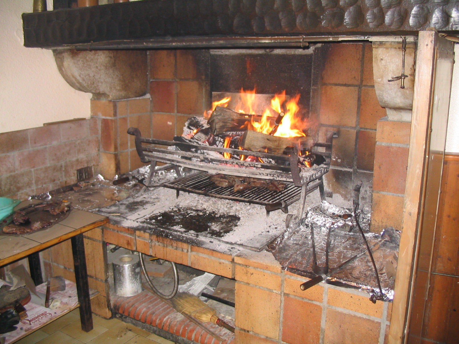 Cuisson des palombes à la braise à Oloron-Sainte-Marie (Pyrénées-Atlantiques) (Pyrénées).